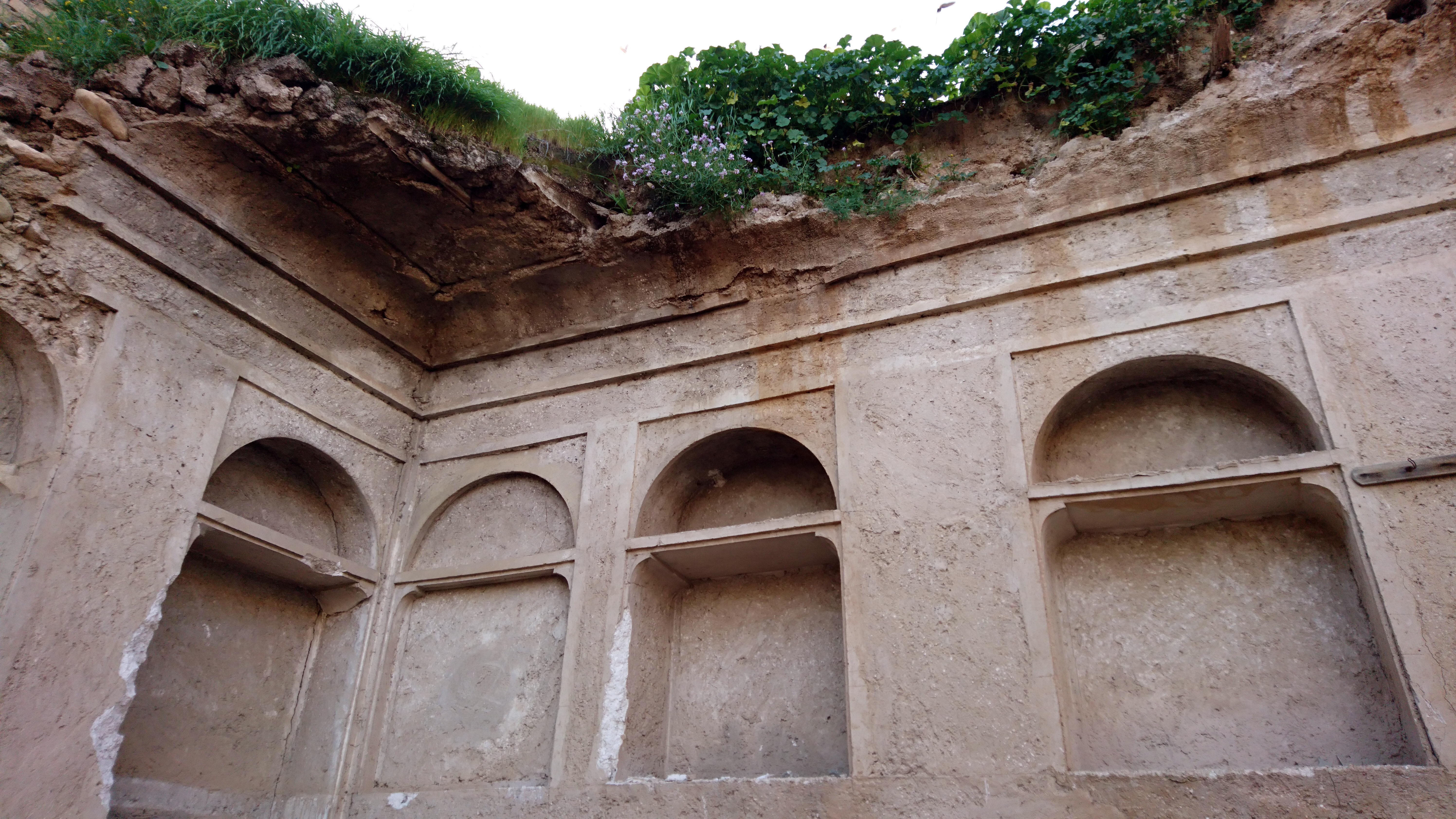 بافت شهری فرسوده صد ساله بهبهان